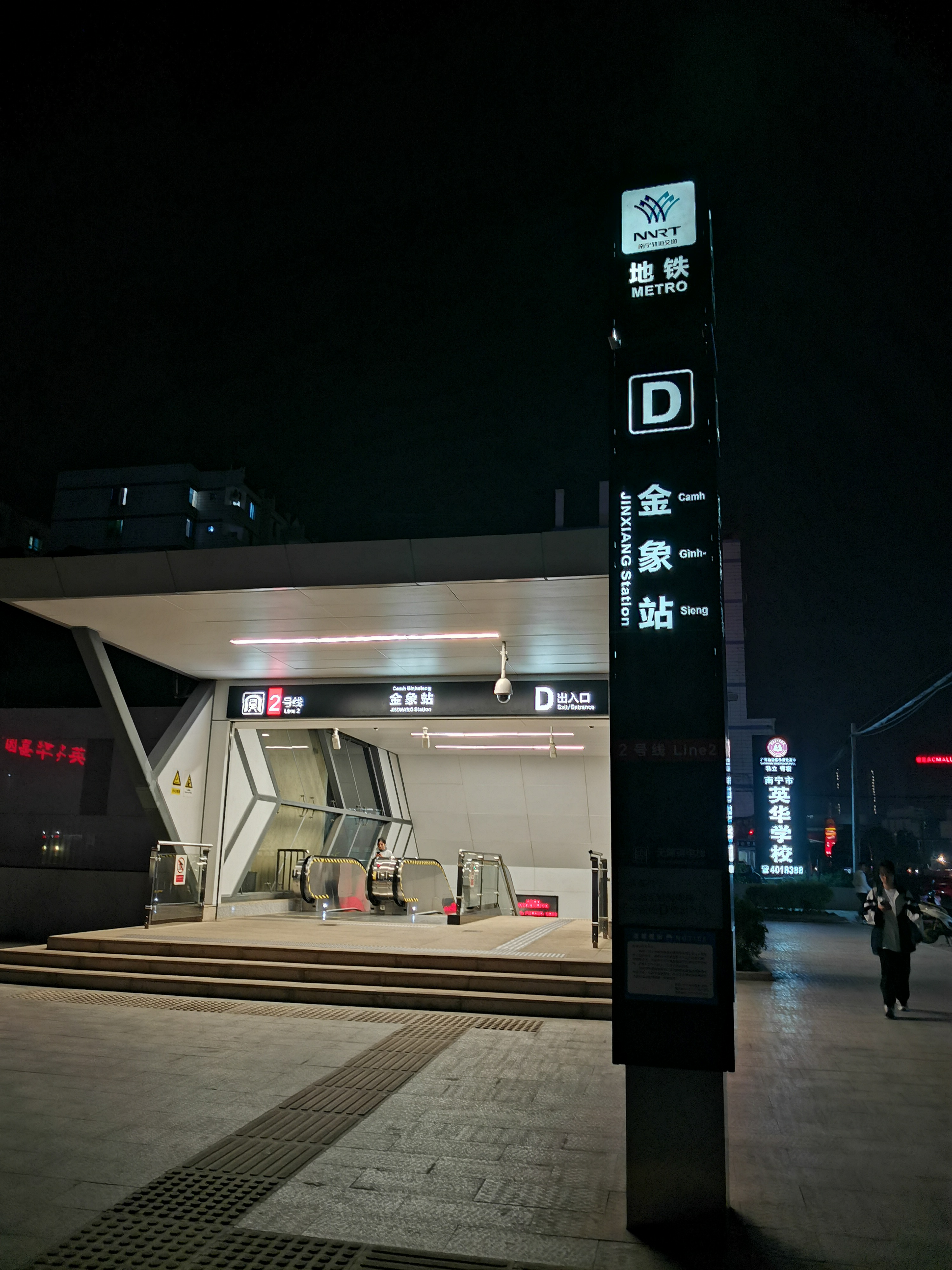 南宁轨道交通五象湖站D出口